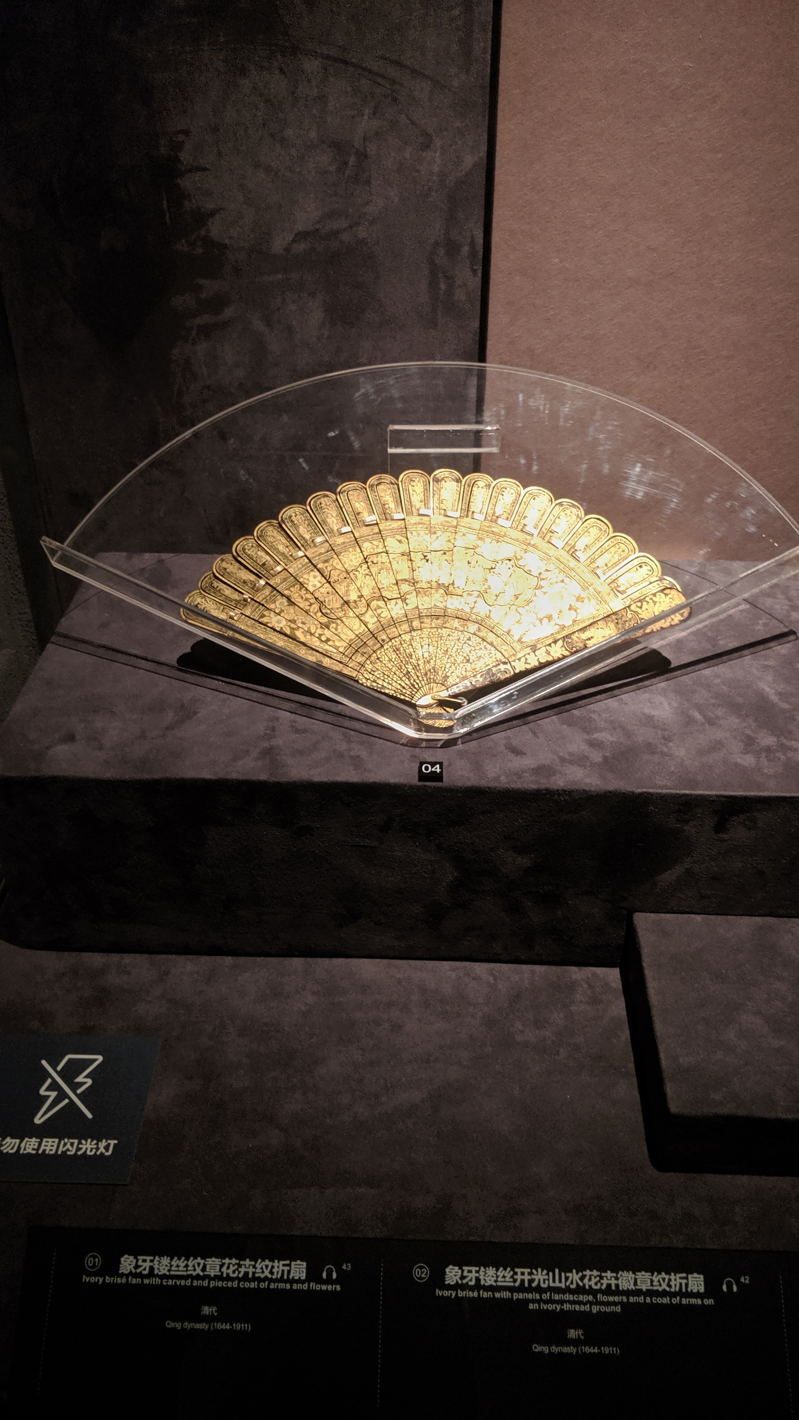 广州博物馆馆藏_清代缕丝折扇